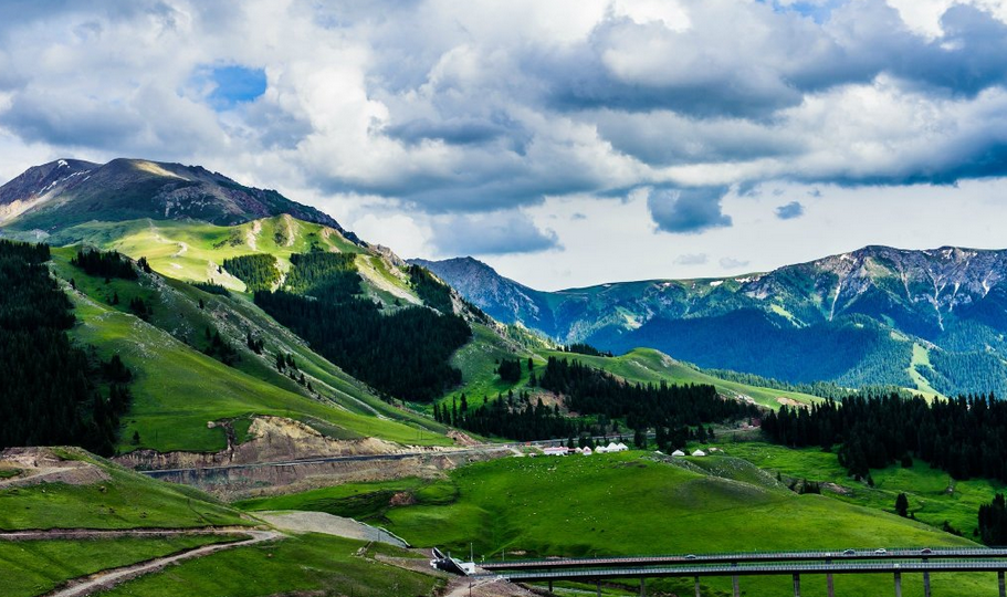 去焦作扫描